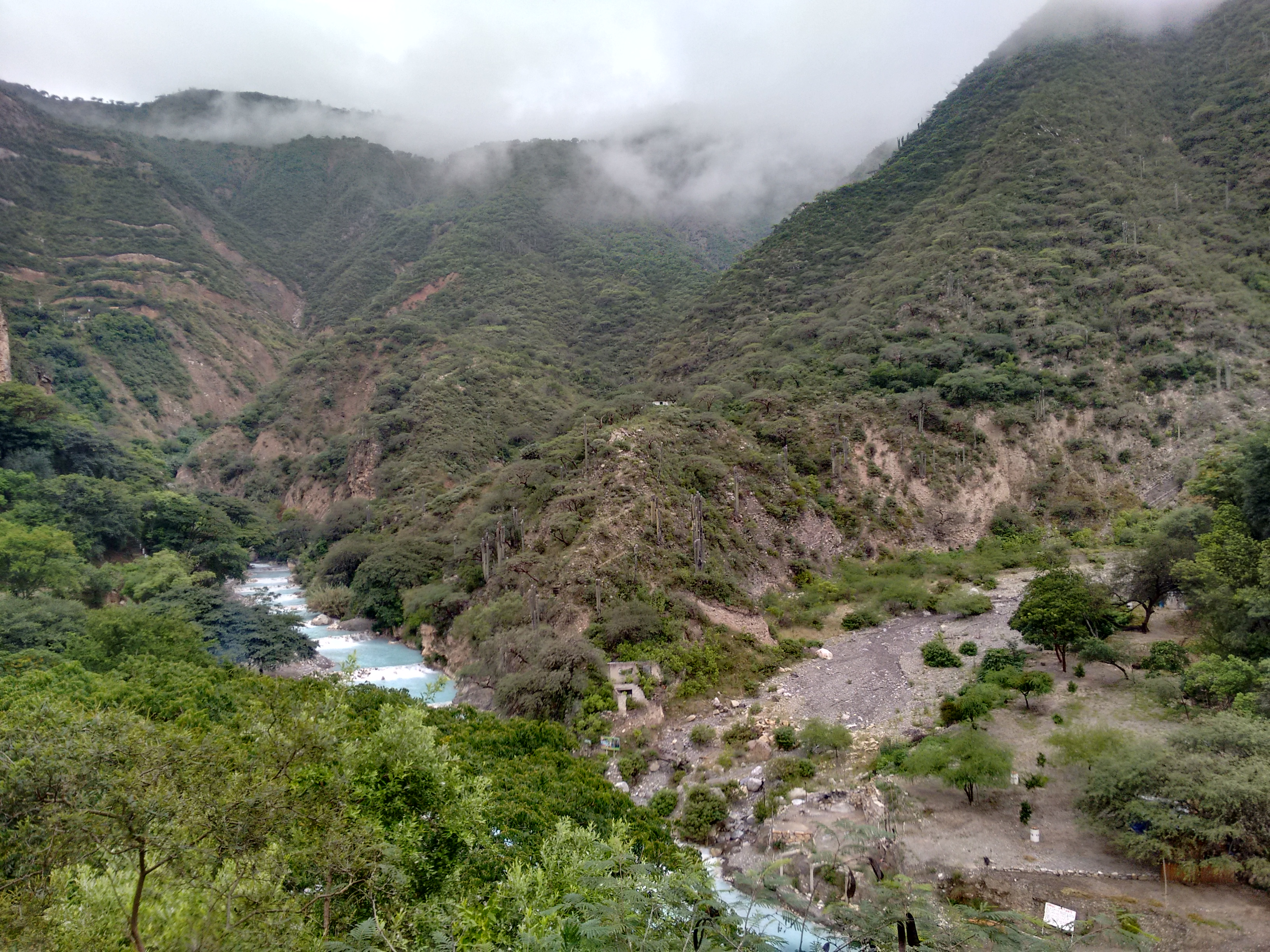 Quise representar la belleza de como las nubes tocan las montañas abriendo un nuevo día.